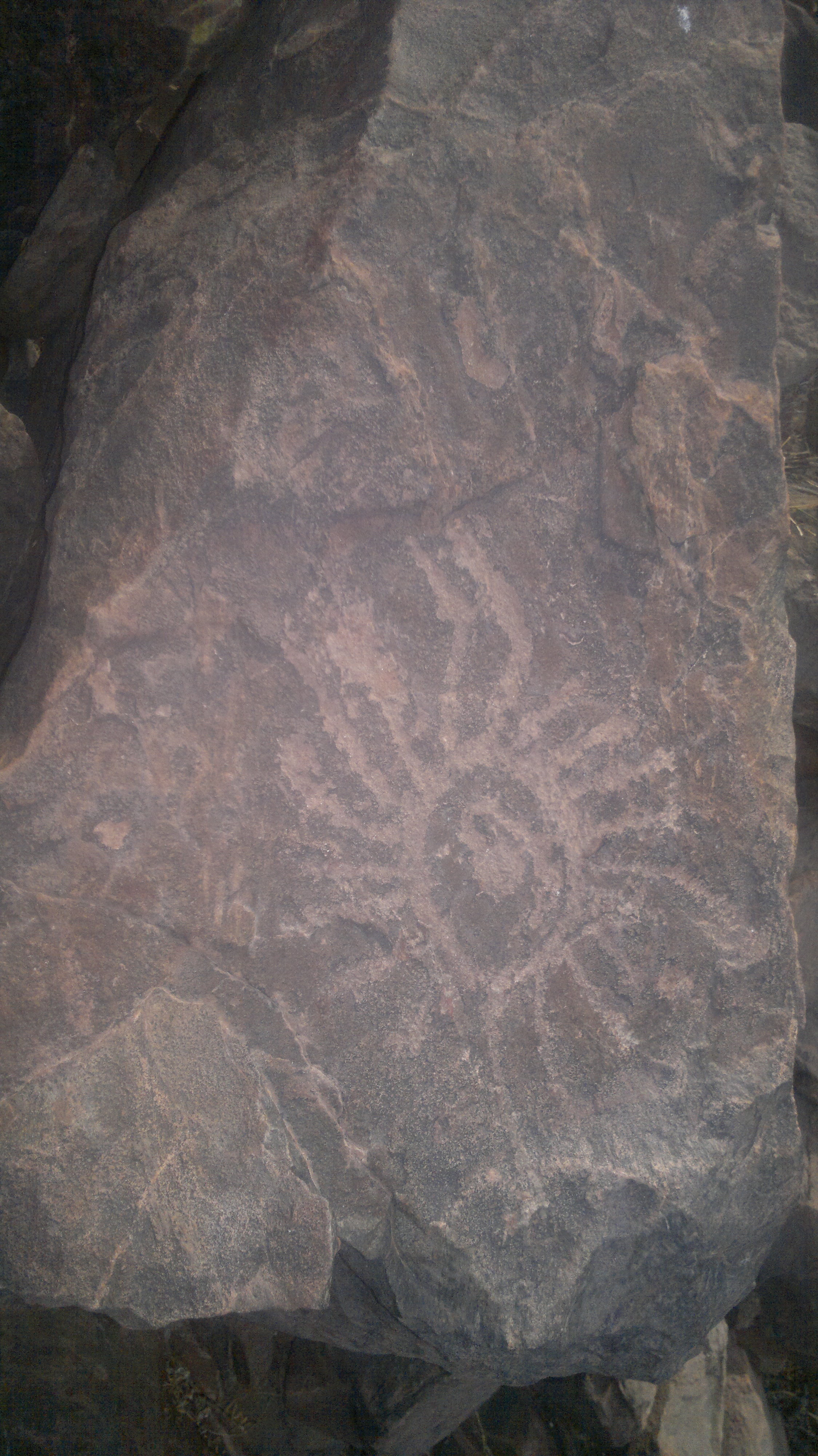 Monumento. Petróglifos El Duraznito